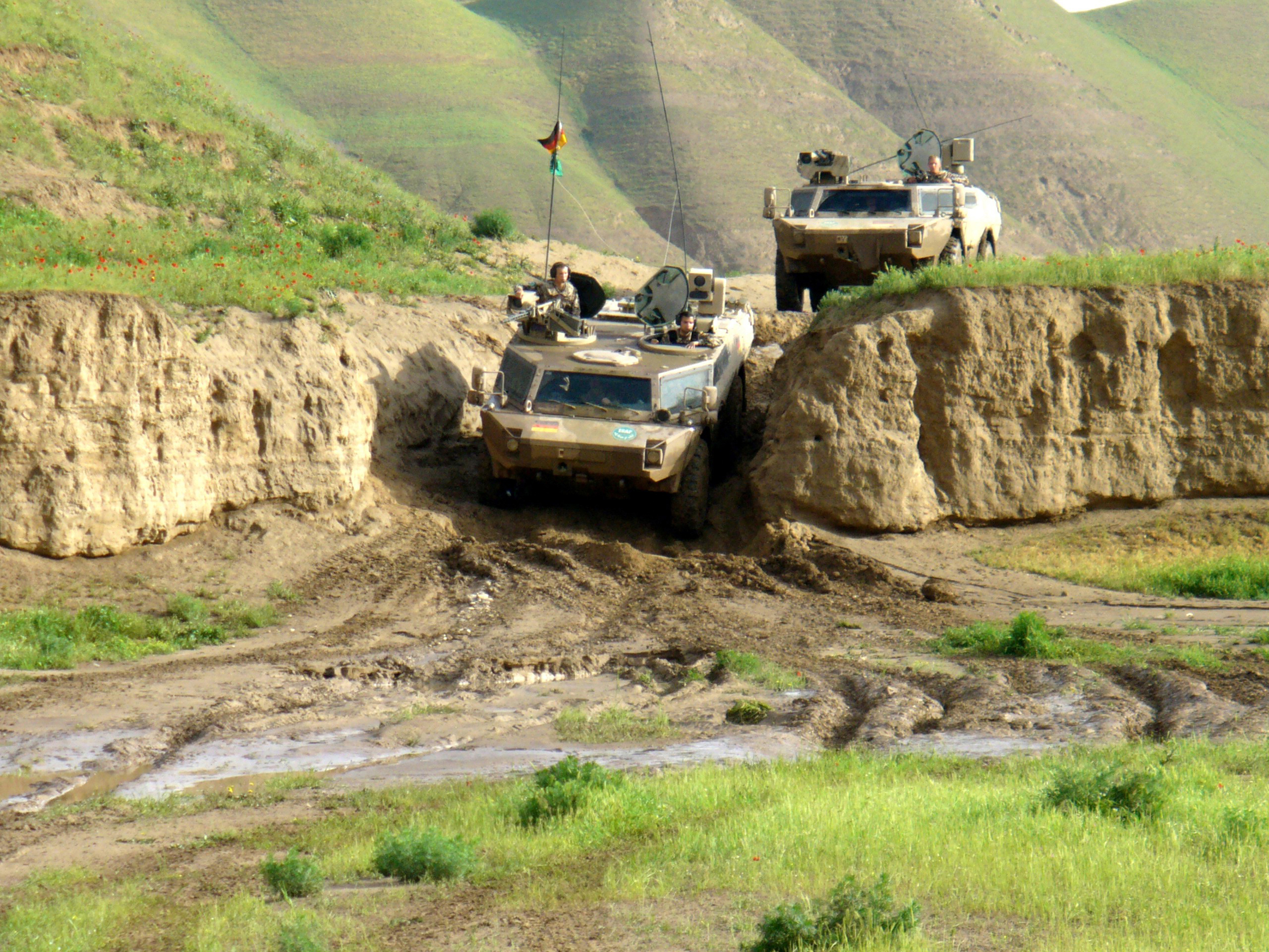 Spähtrupp mit Fennek im Einsatzland. ©Bundeswehr/Piz Heer